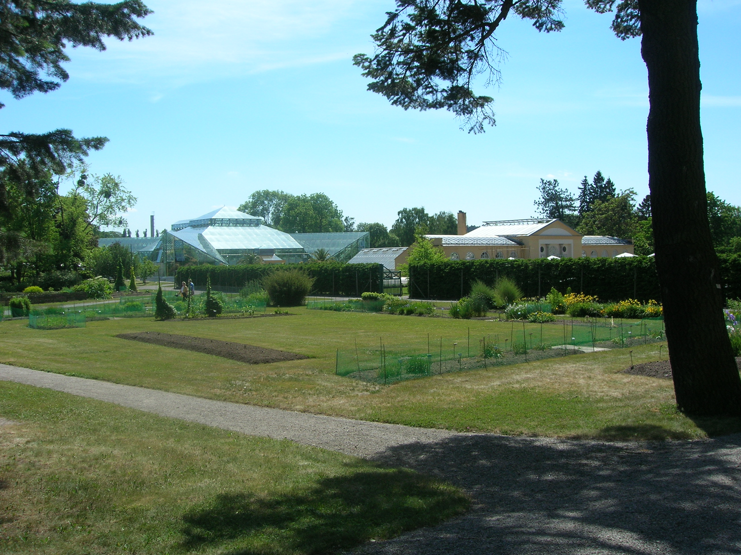 Medelhavsväxthuset och Gamla Orangeriet, Bergianska Trädgården, Stockholm, Sweden.